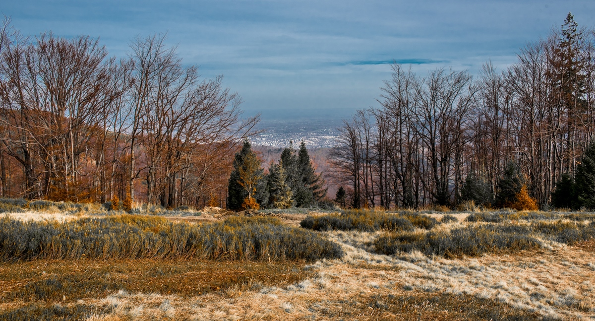 Bielsko-Biała Siodło pod Klimczokiem